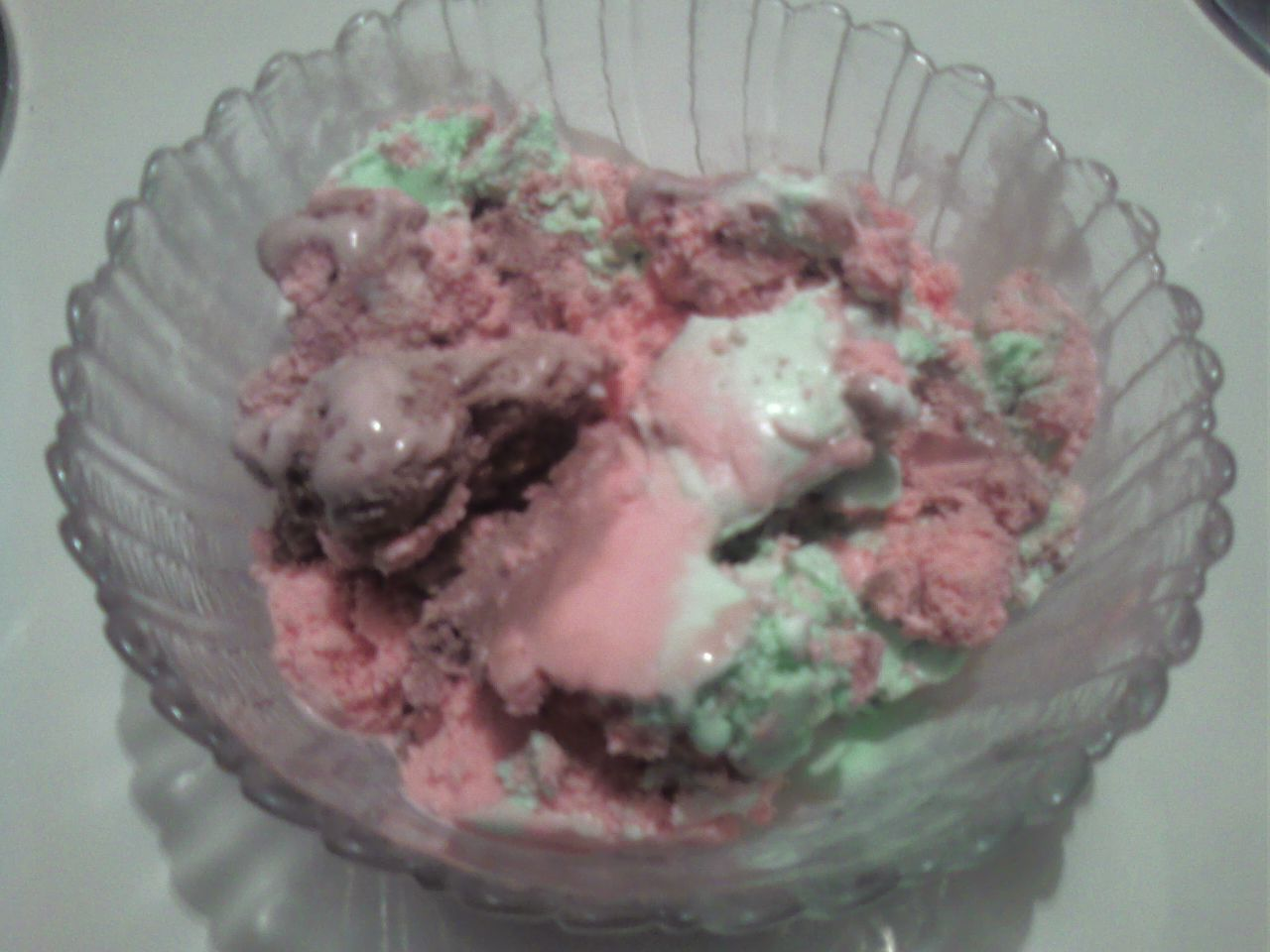 Spumoni